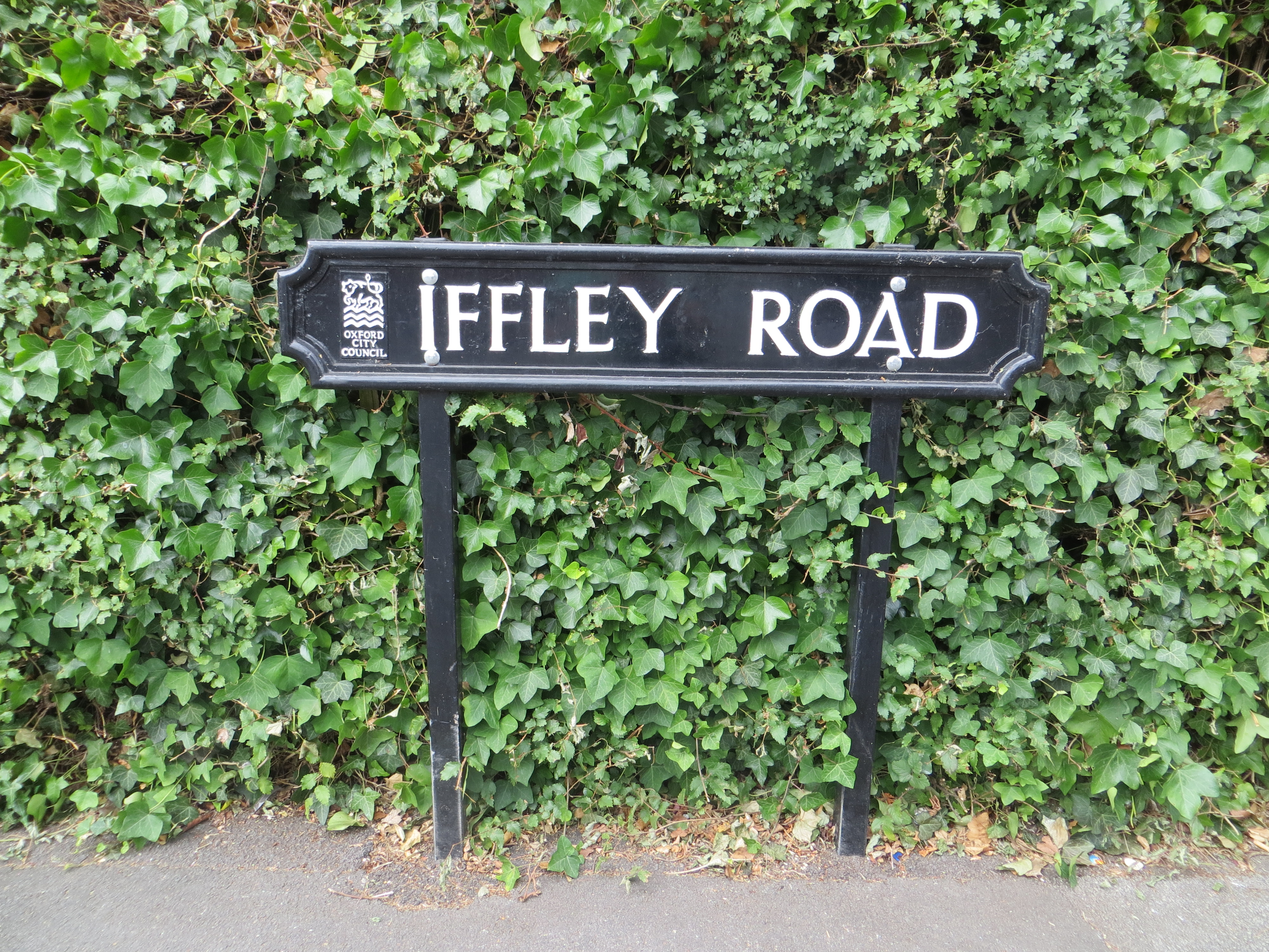 Iffley Road Oxford